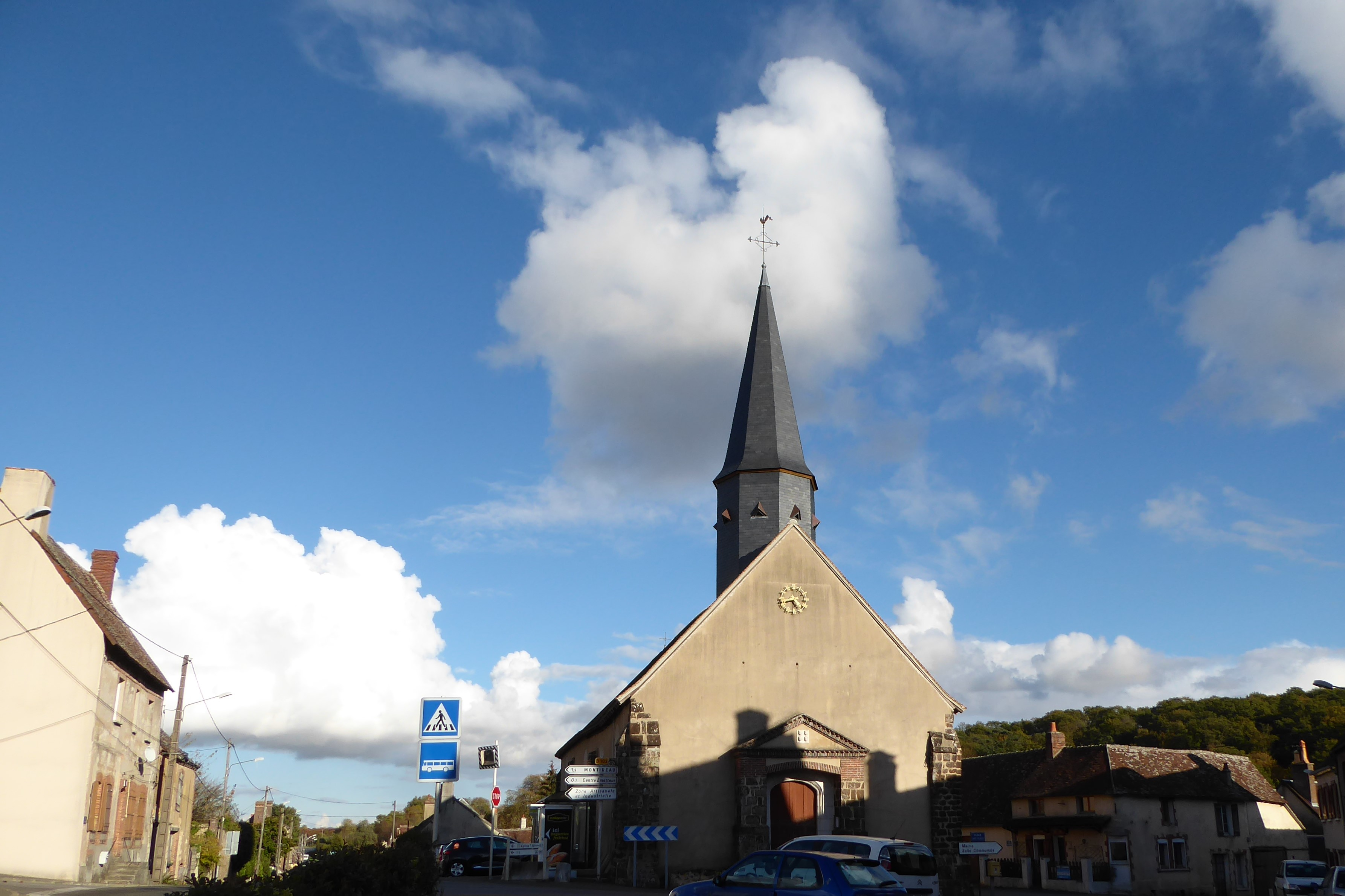 église Saint-Jacques de Montlandon, Eure-et-Loir, France.